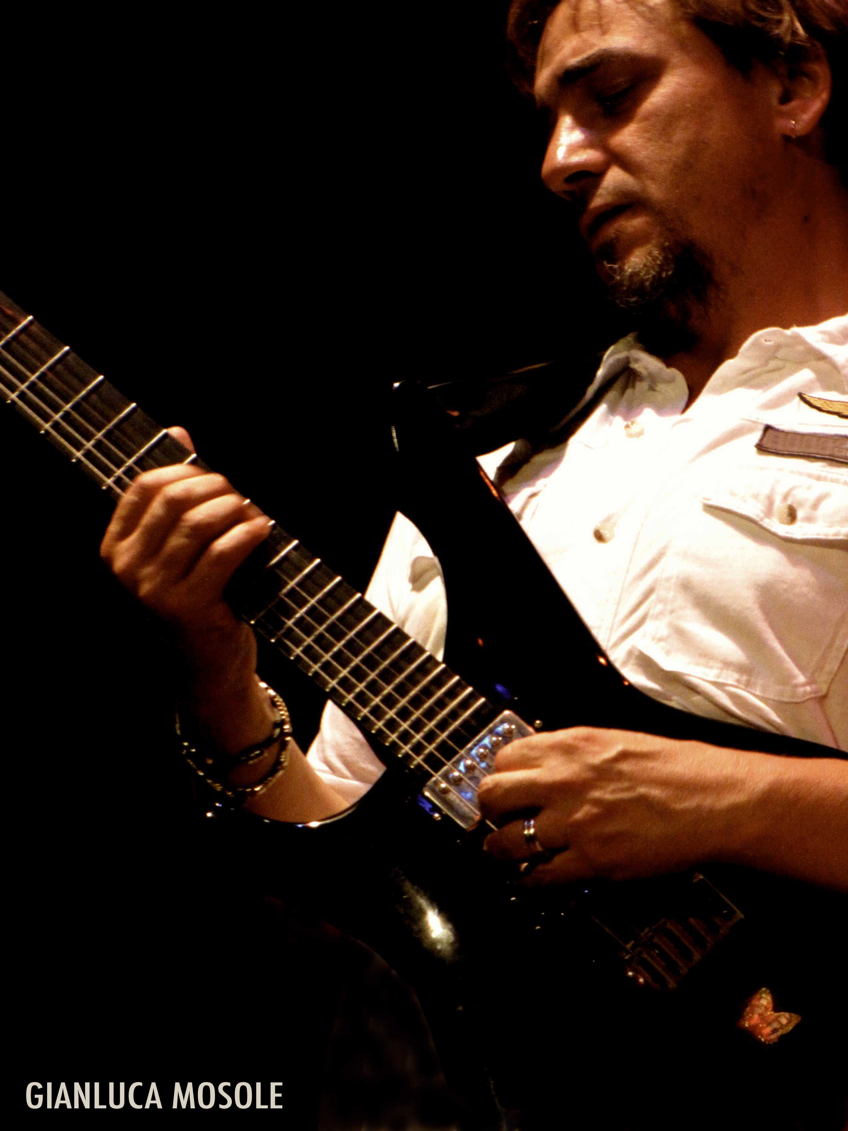 gianluca mosole live 2010